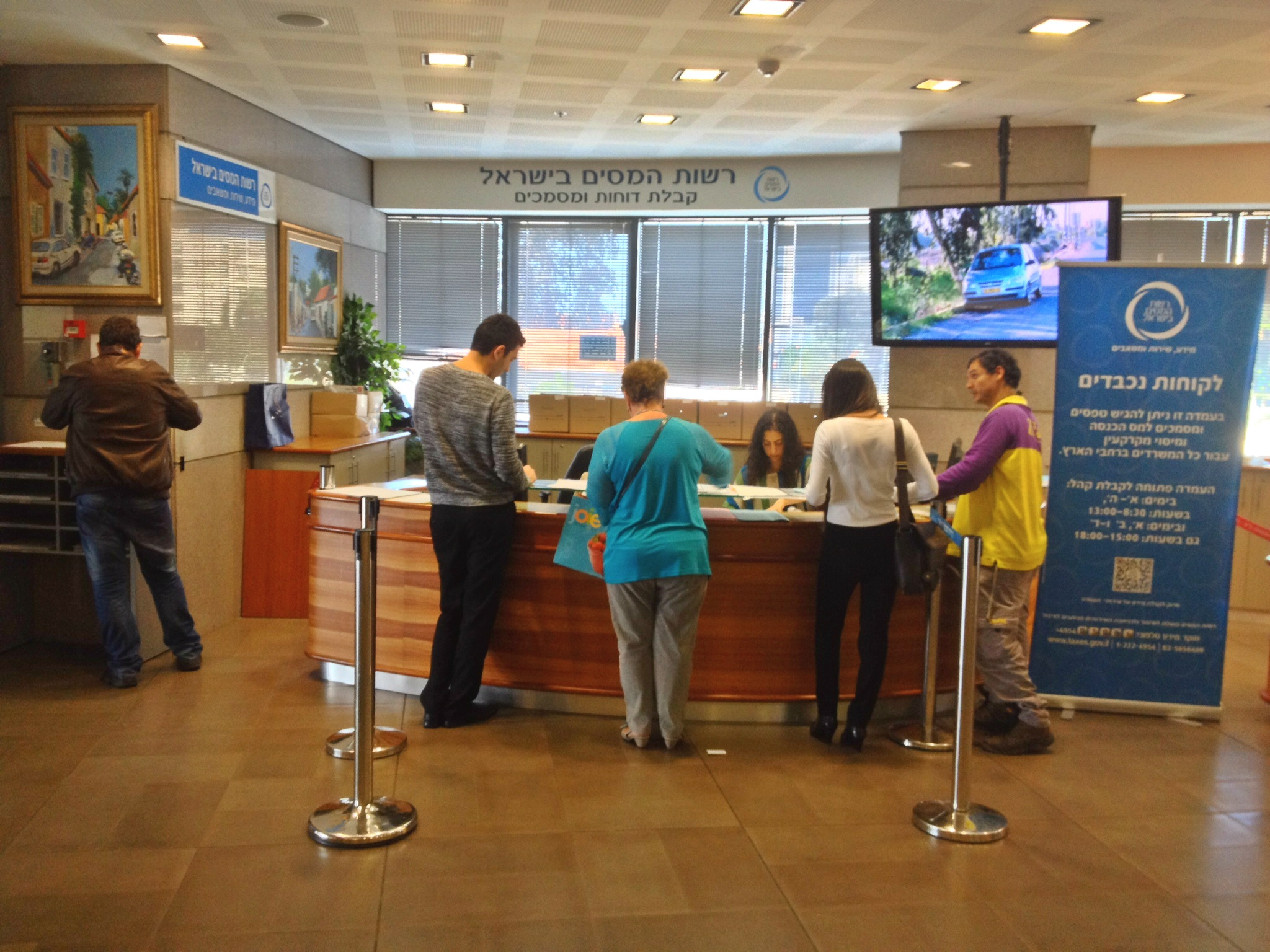 דלפק הקבלה של המרכז הארצי למידע, שירות ומשאבים בקריית הממשלה תל אביב